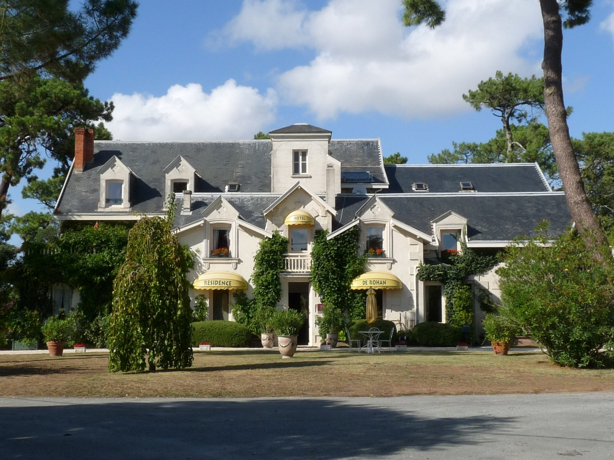 Ancien logis de Rohan devenu hôtel, domaine des Fées, Vaux-sur-Mer, Charente-Maritime, France